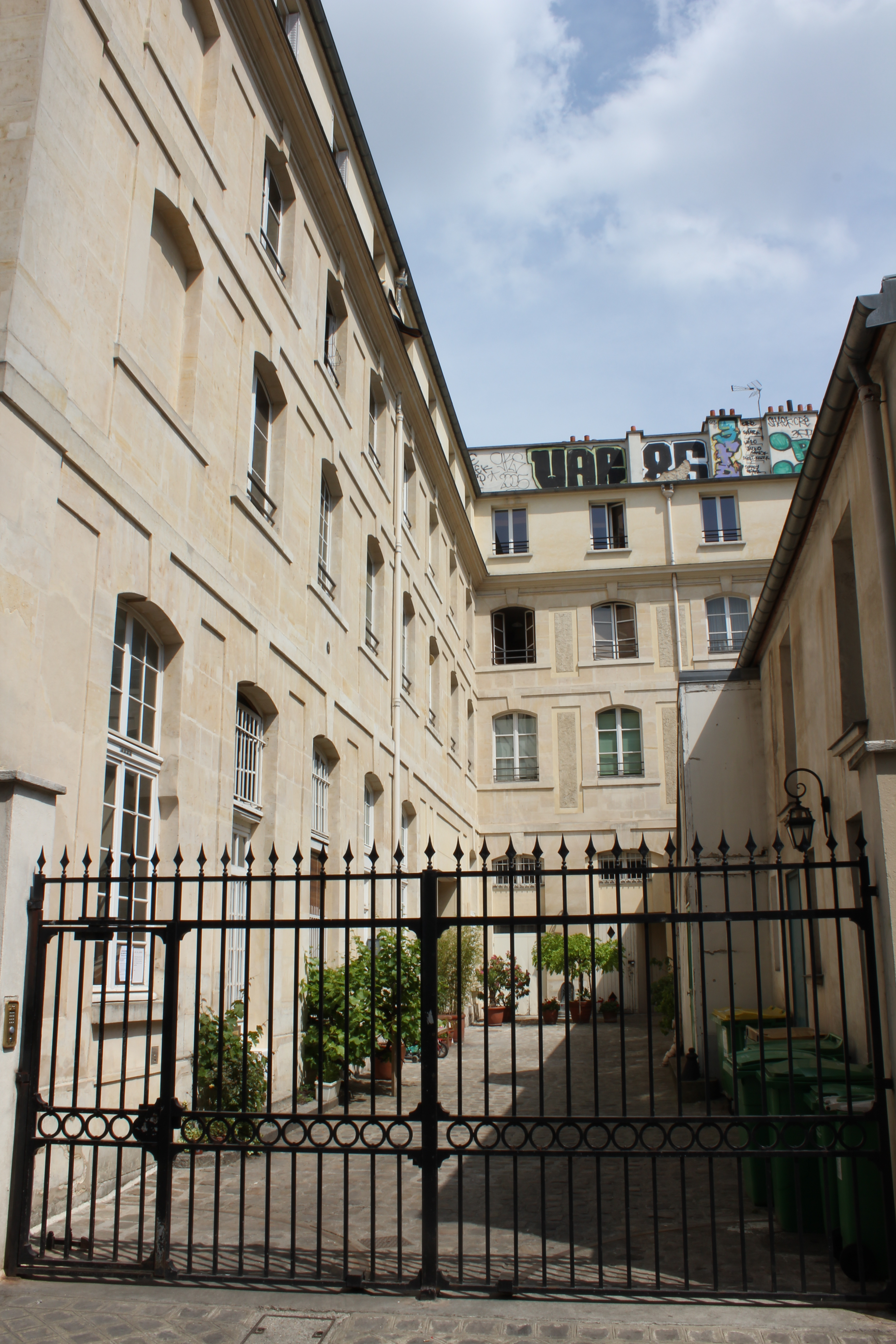 Couvent des Bénédictines du Bon-Secours, 99-101 rue de Charonne à Paris.